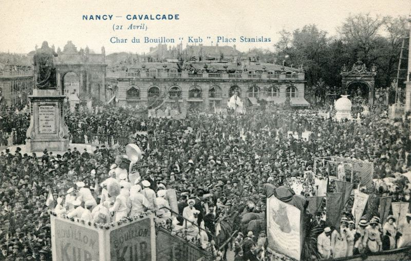 Le Char publicitaire du Bouillon Kub à la Cavalcade du 21 avril 1921 place Stanislas.